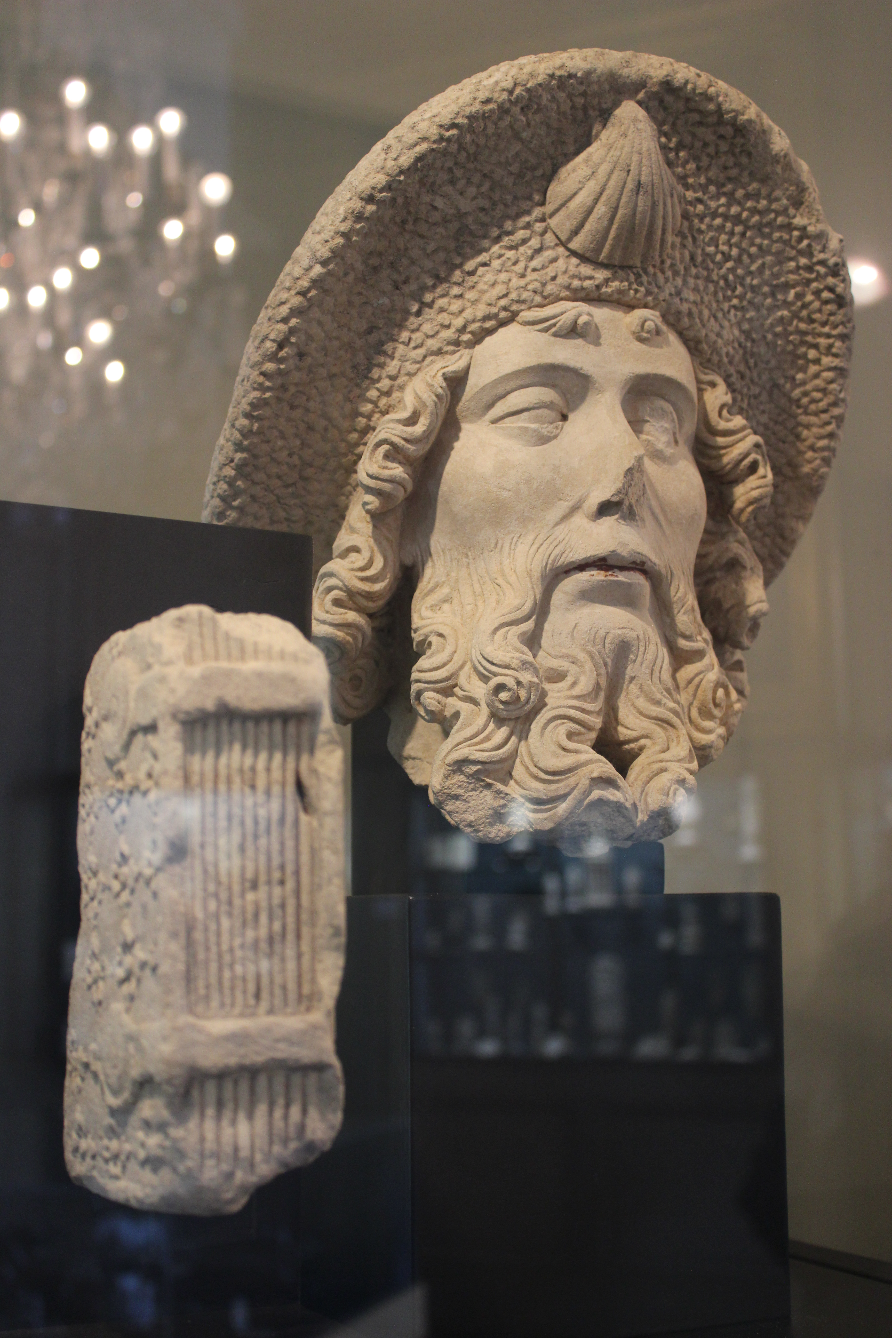 tête de saint Jacques pierre de Caen XV-XVIe s - musée de Dieppe (100wikicommonsdays day 59)